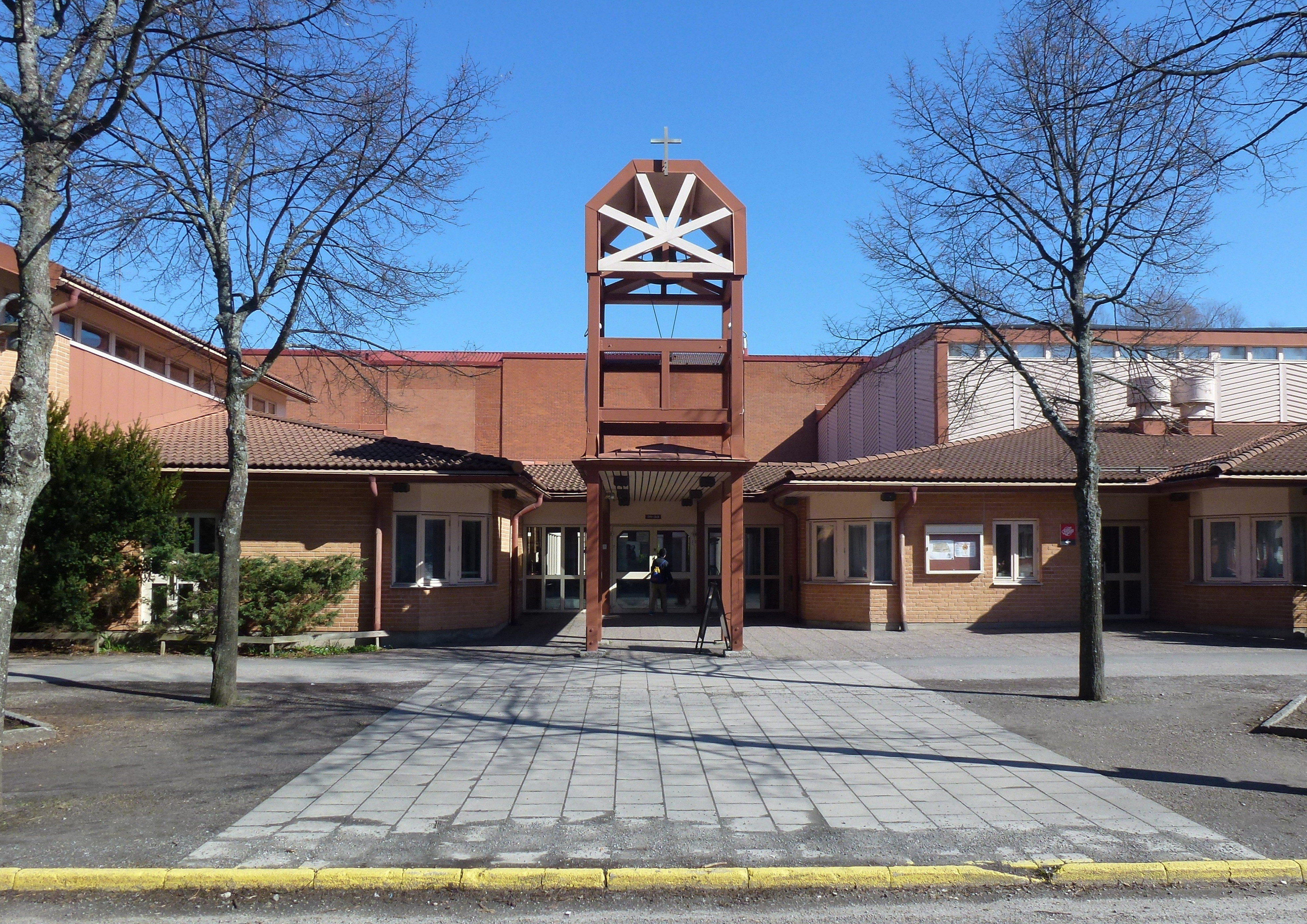 Skarpnäckskyrkan